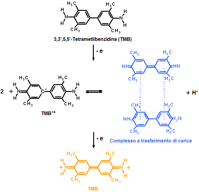 sono l'autore